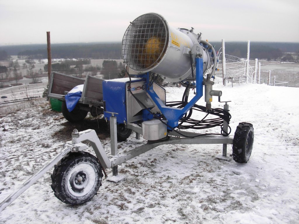 Armatka śnieżna w Myślęcinku